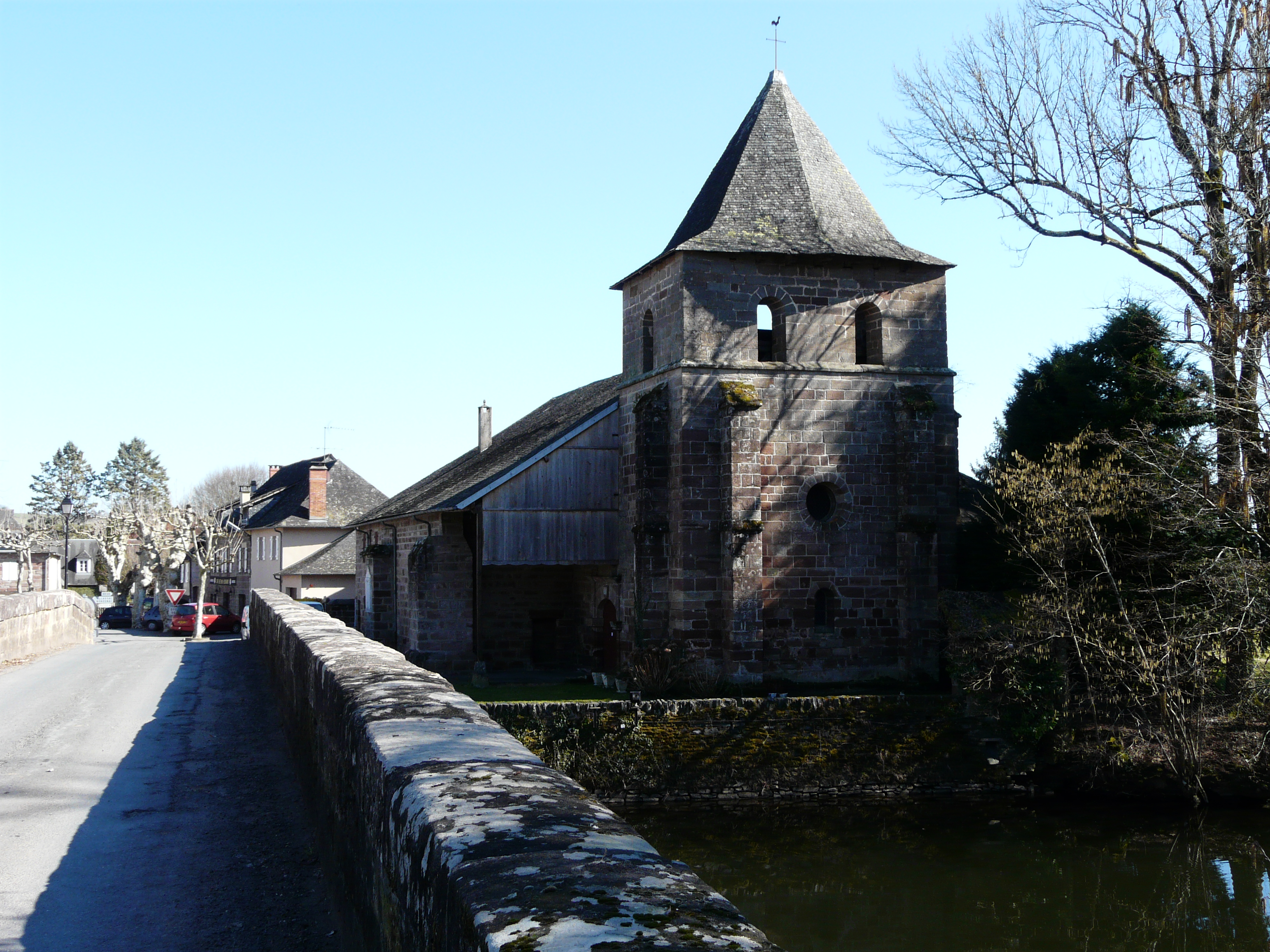 La Vézère au pied de l'église Saint-Viance, saint-Viance, Corrèze, France.